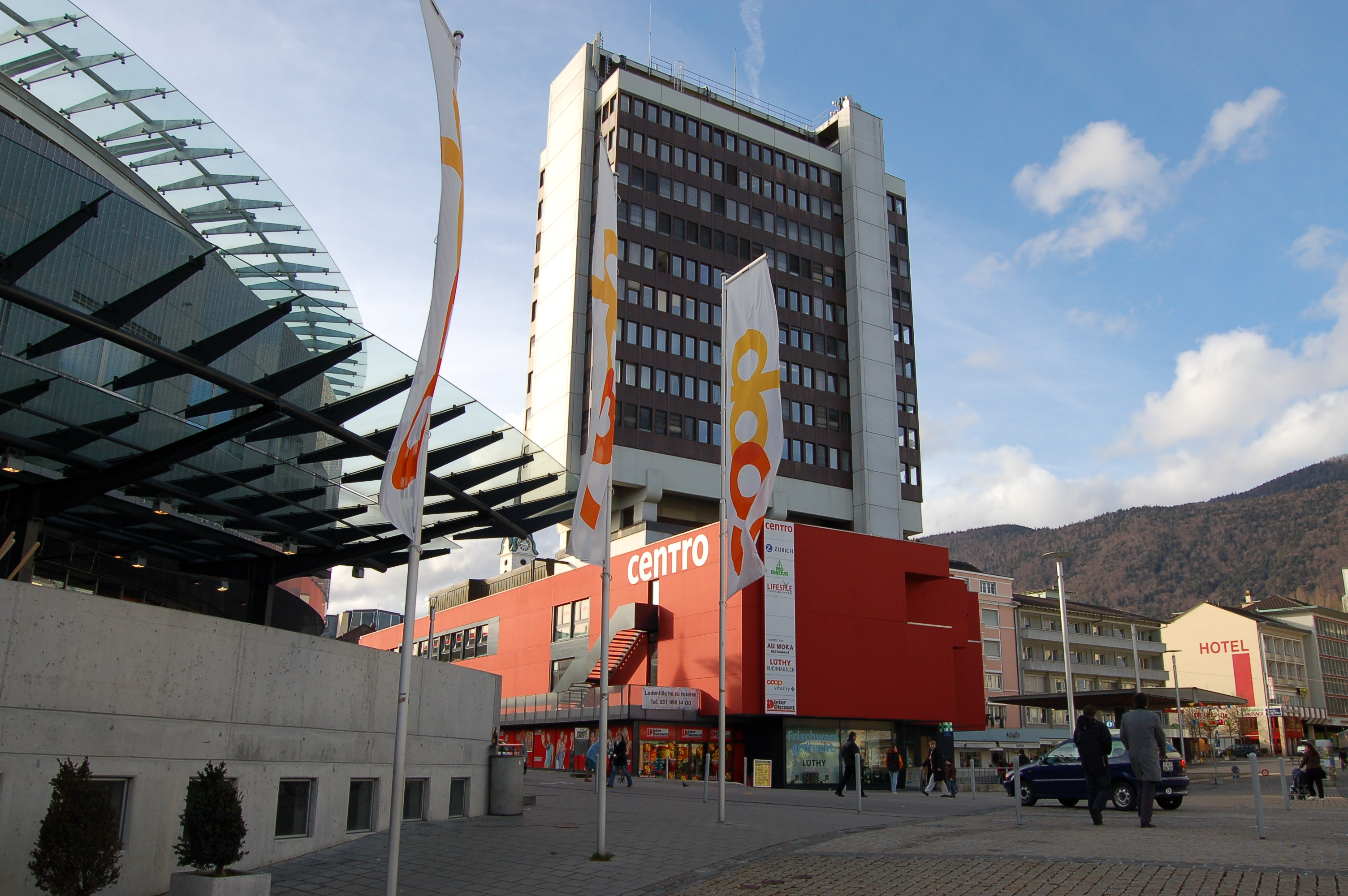 Grenchen Wakkerpreis 2008